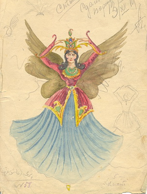 Pəri surətinə çəkilmiş geyim eskizi. Ölçüsü - 20 x 20.5. Z.Hacıbəyov. "Aşıq Qərib". 1920 - 21 - ci il mövsümü. Əzim Əzimzadə.